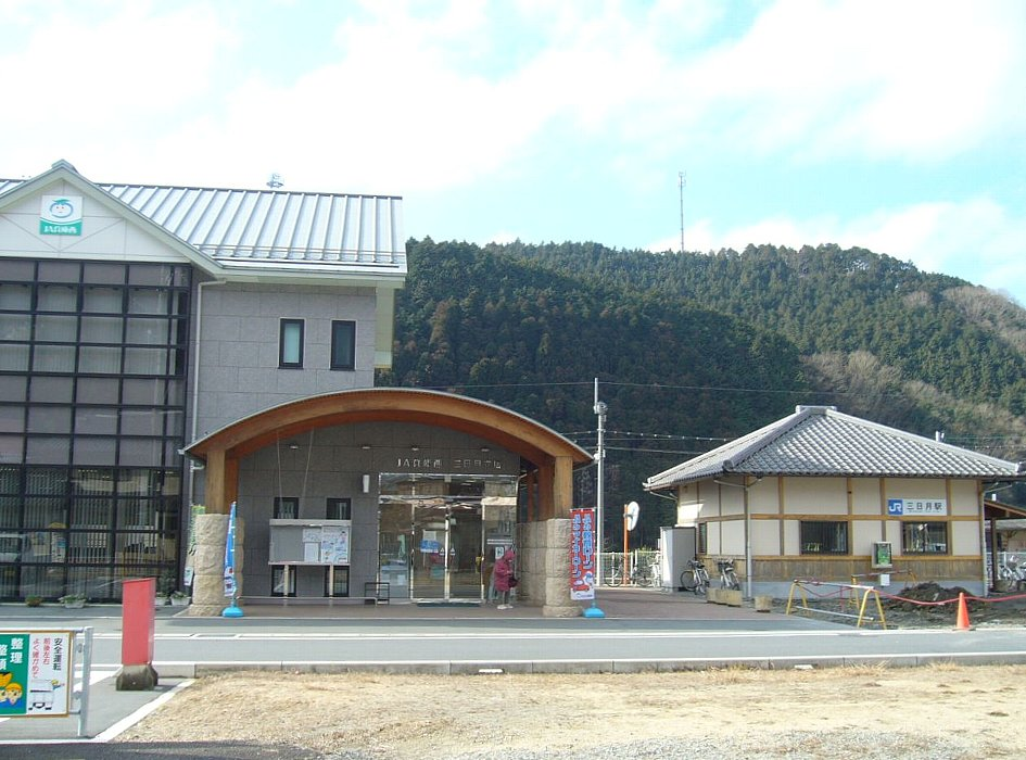 三日月駅駅舎（右） 左は兵庫西農協三日月支店